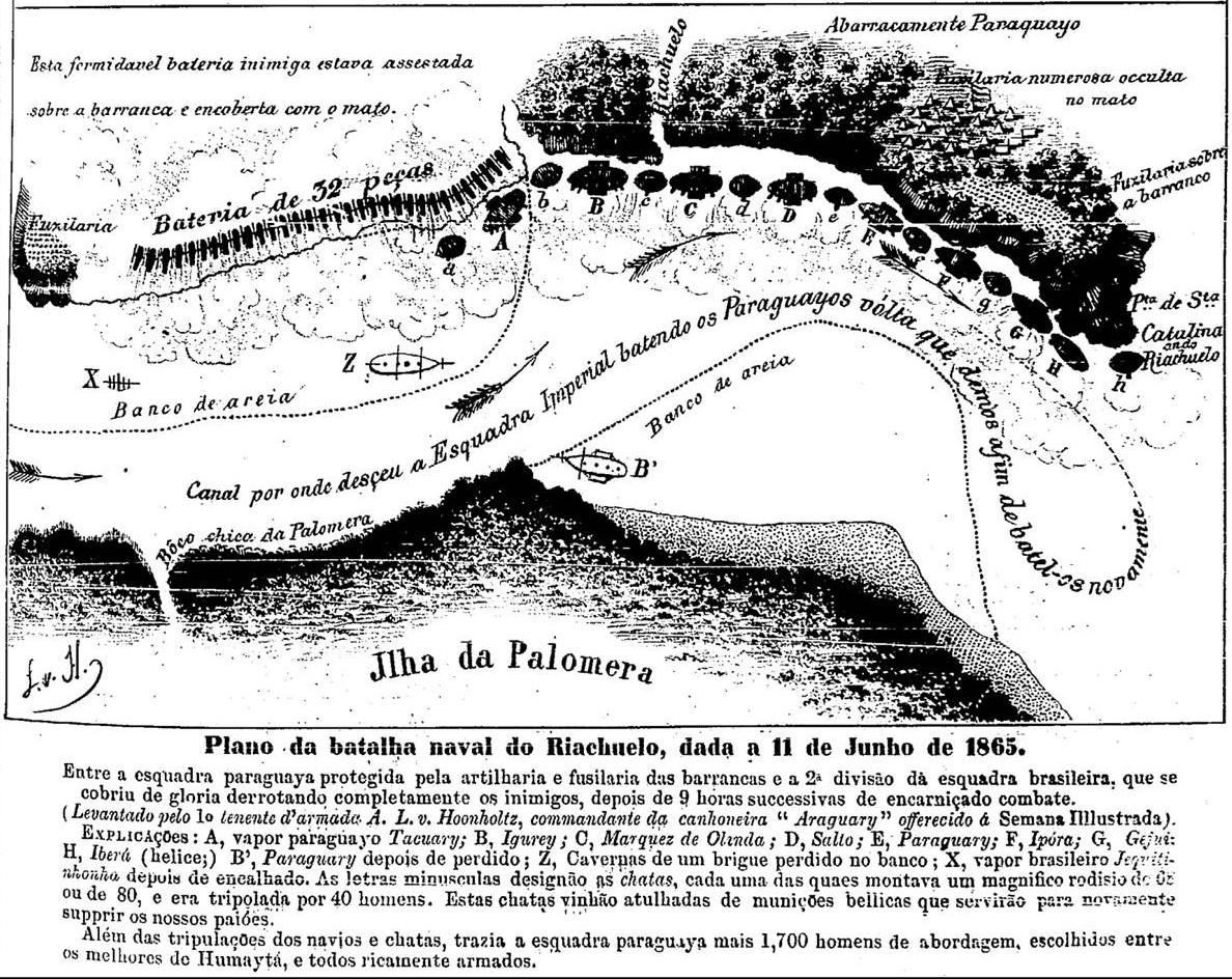 Plano da batalha naval do Riachuelo, dada a 11 de Junho de 1865.